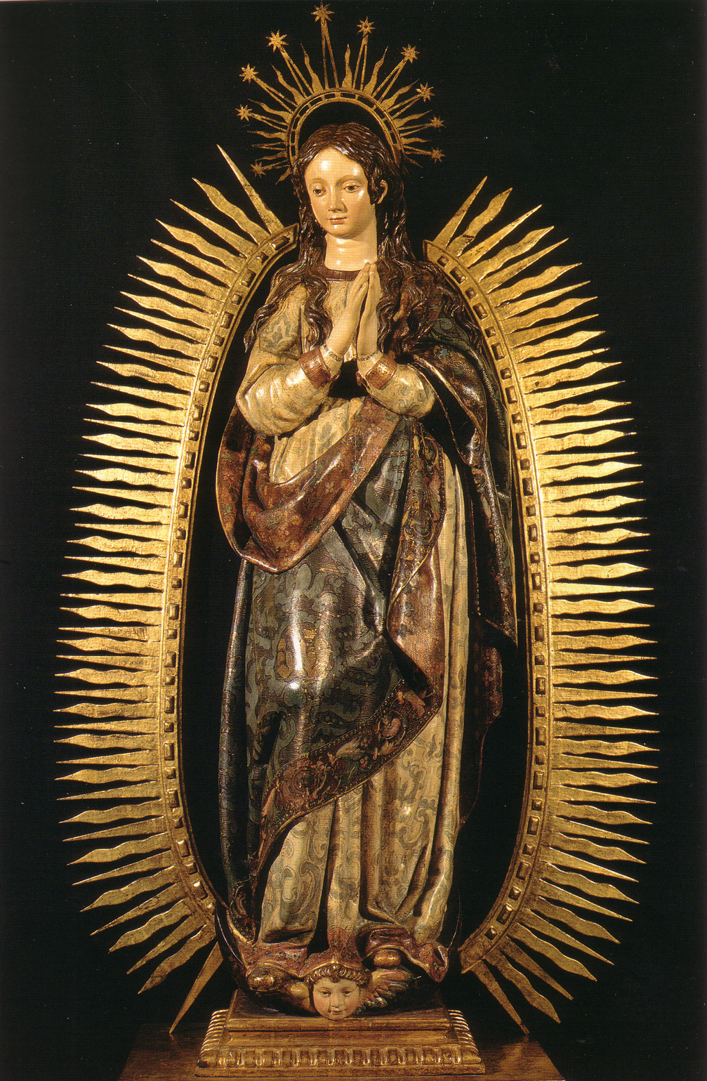 Imagen de la Inmaculada tallada en el siglo XVII por Gregorio Fernández